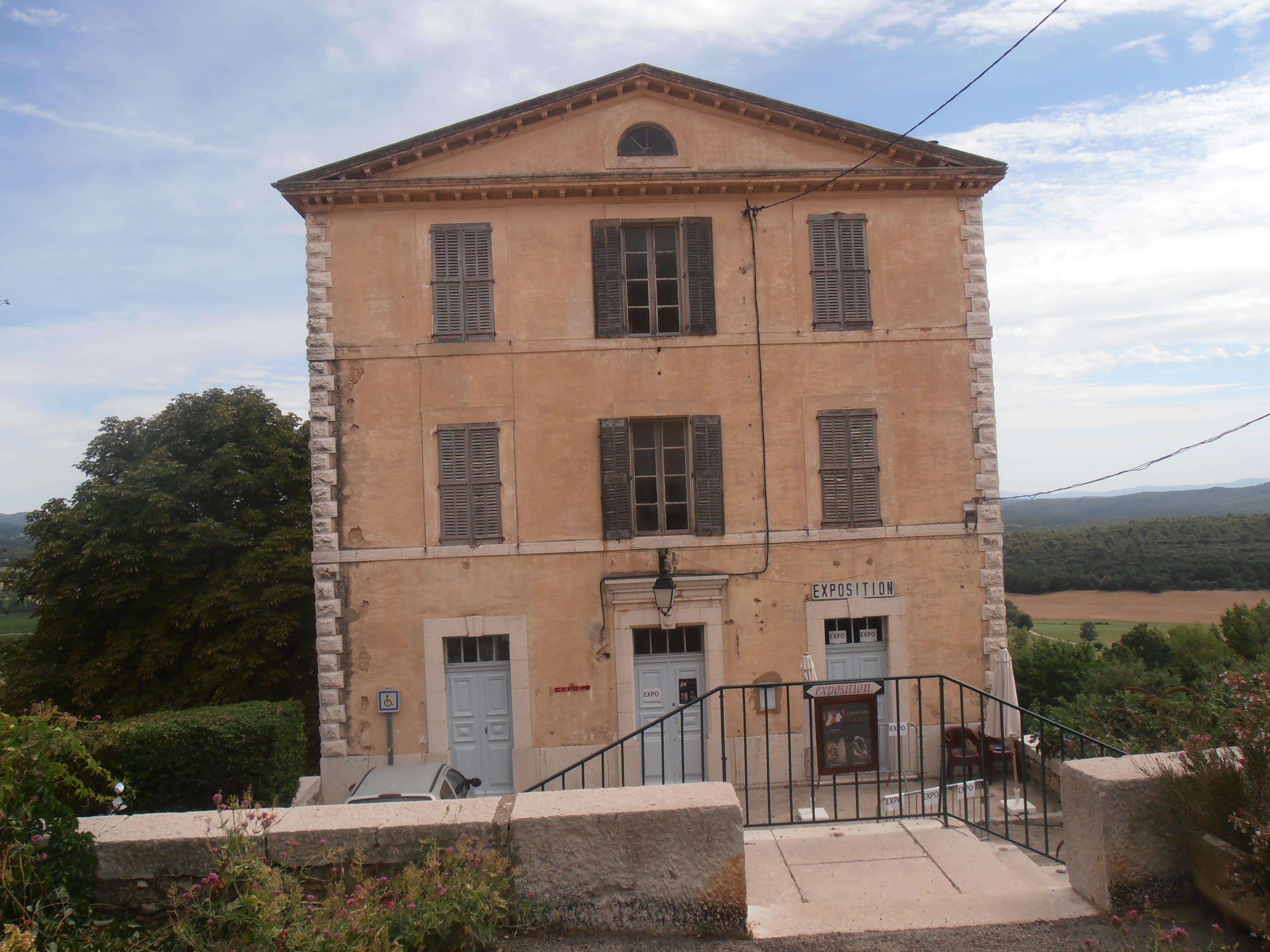 Var, Moissac-Bellevue, Bâtiment d'expositions